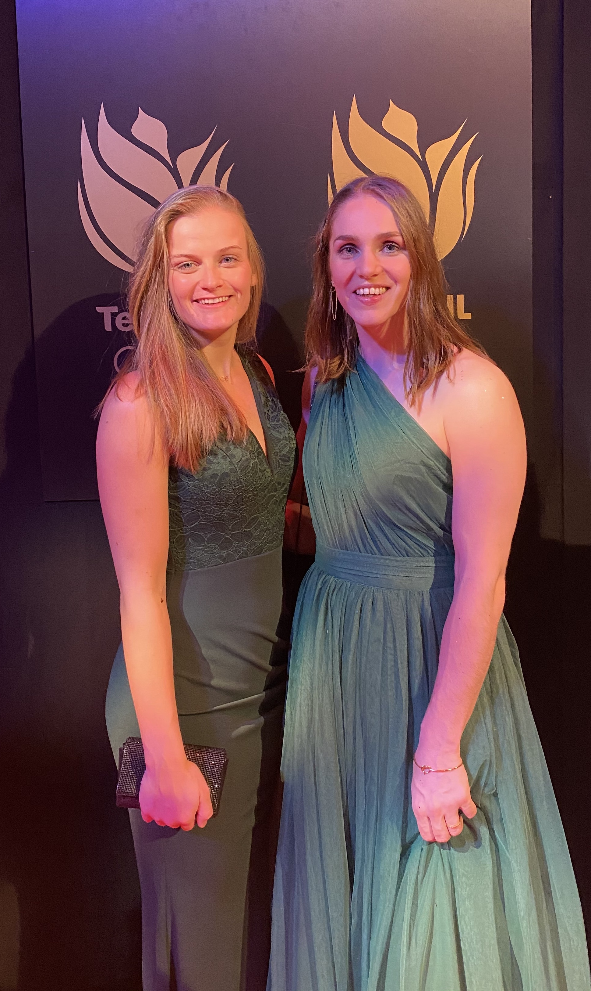 Debbie en Laura op NOC/NSF Sportgala in Amsterdam.